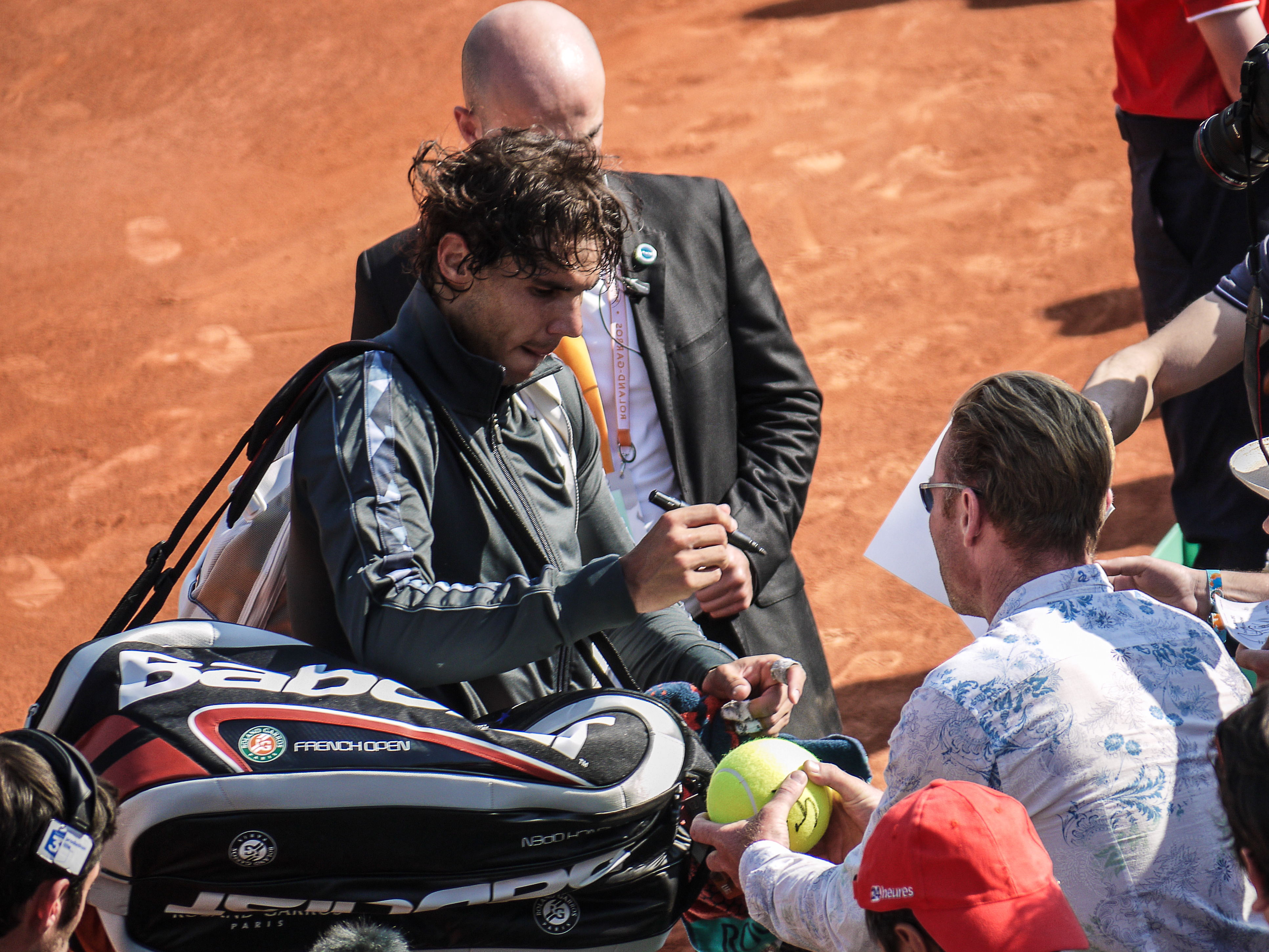 1er tour Roland Garros 2012 : Rafael Nadal (ESP) def. Simone Bolelli (ITA)